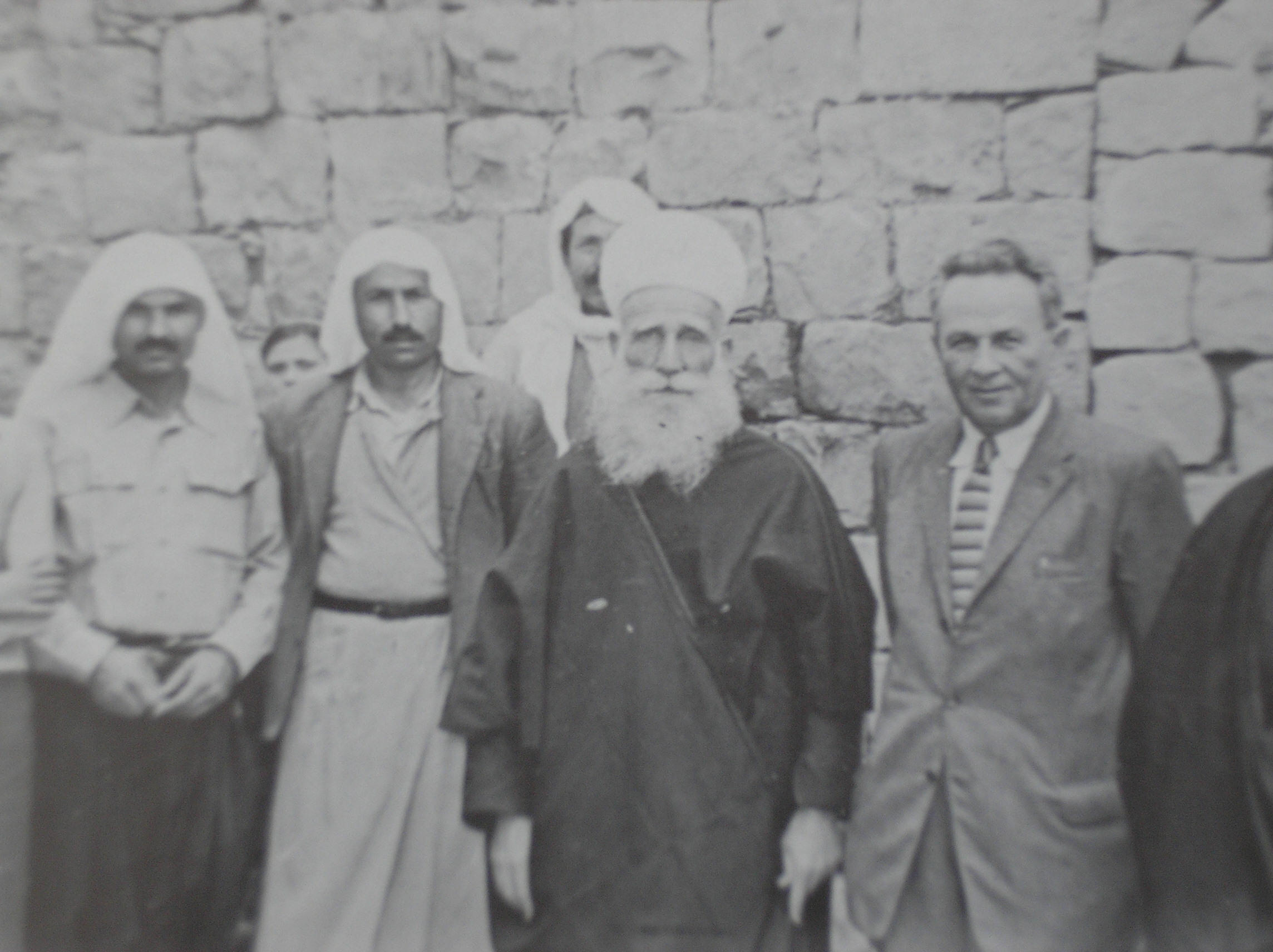 אבא חושי עם מנהיגי העדה הדרוזית